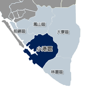 小港區相對位置